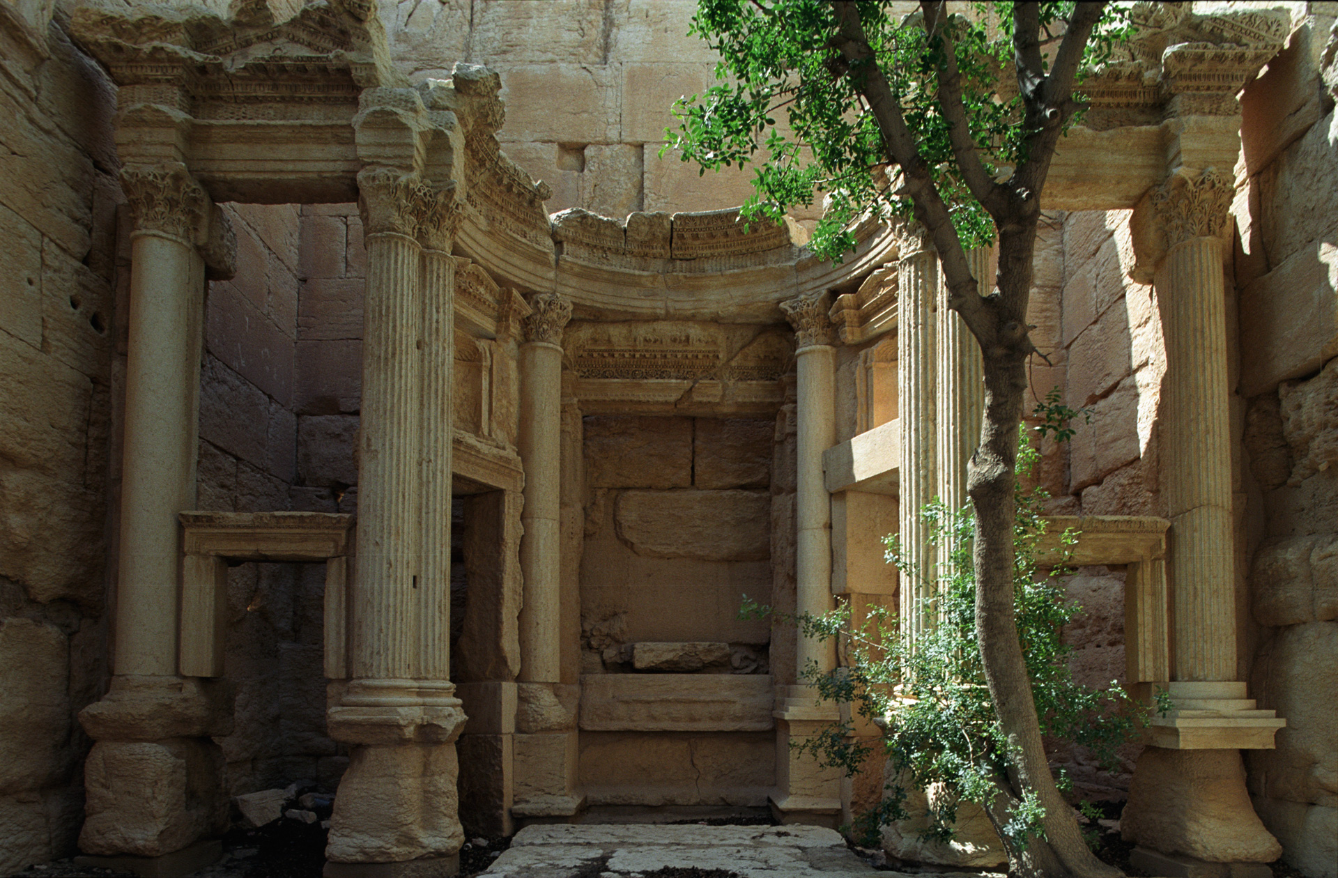 Palmyra, Baal-Shamin Temple